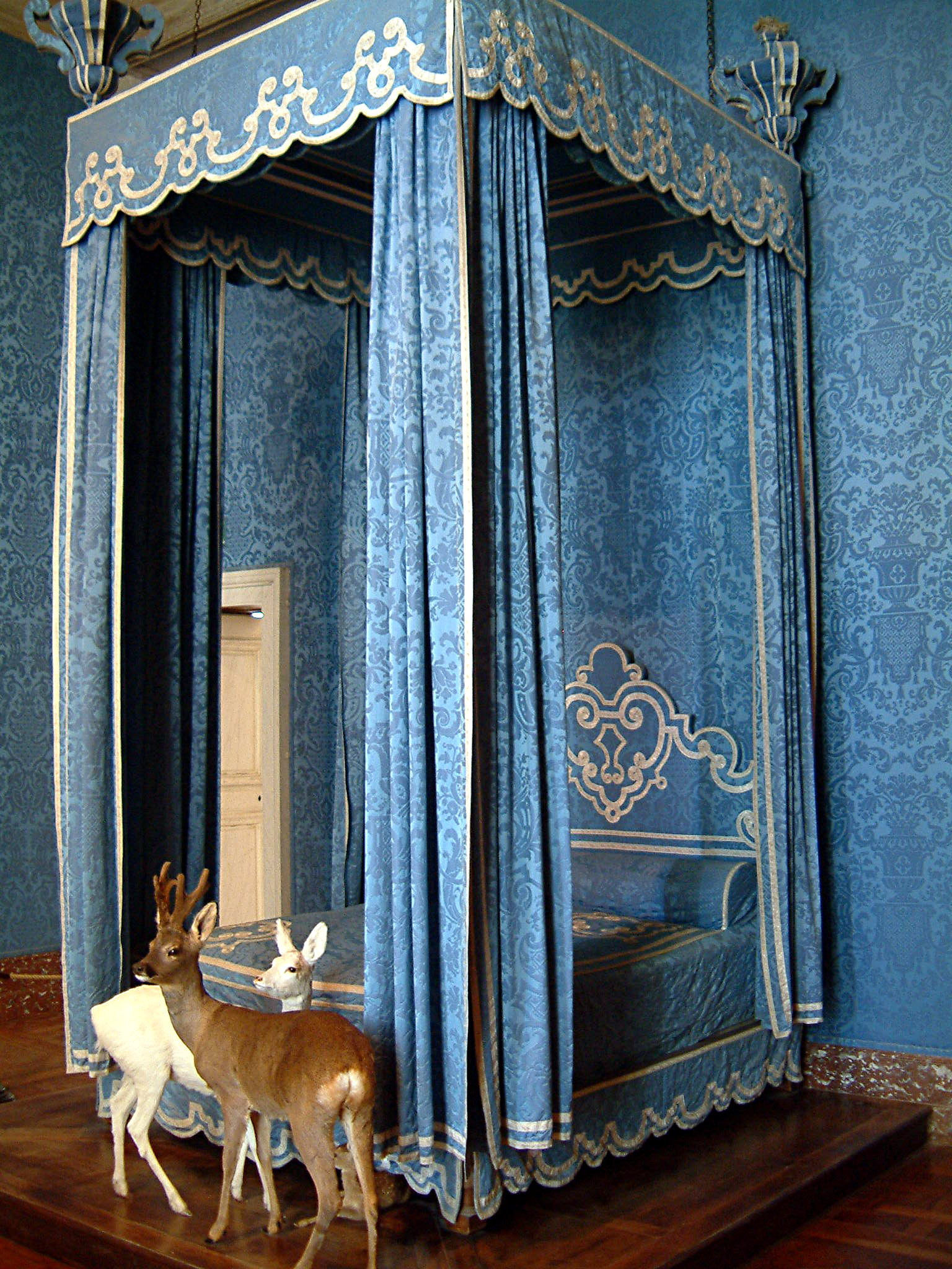 Lit, Château de Chambord, Chambord, FRANCE